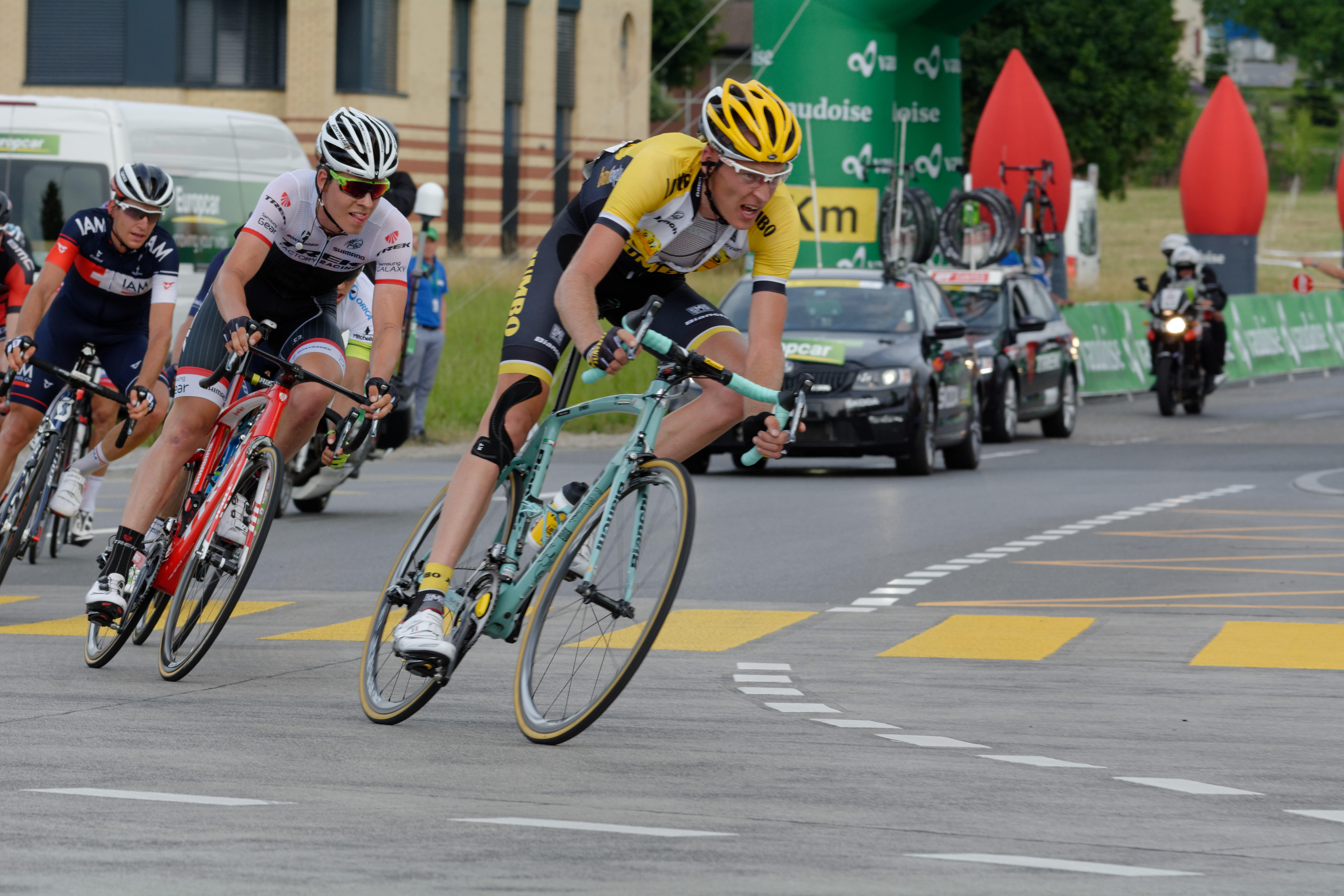 D71_0426_DxO